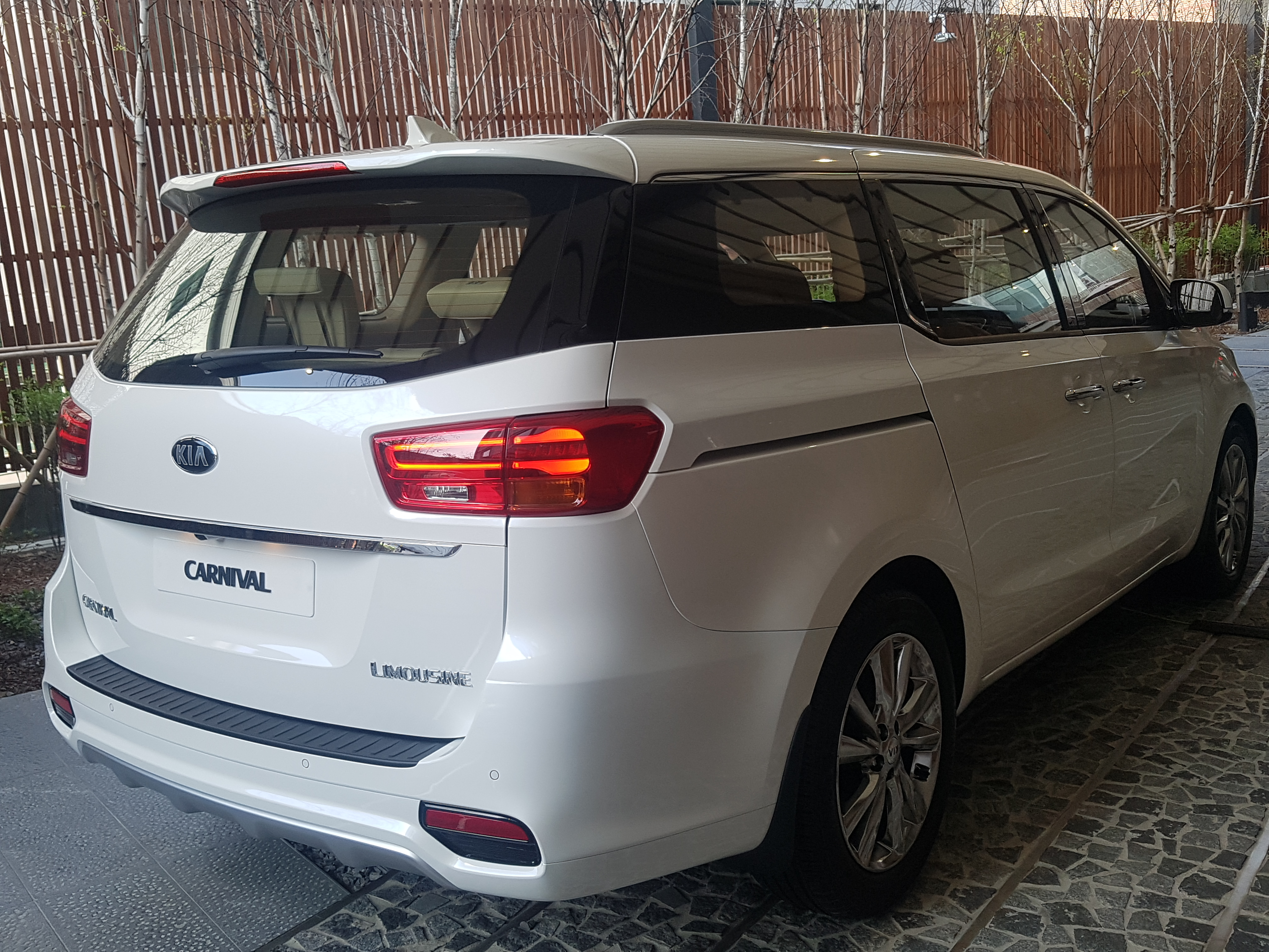 기아 더 뉴 카니발 후측면